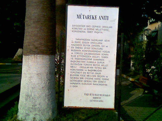 Mütareke Anıtı